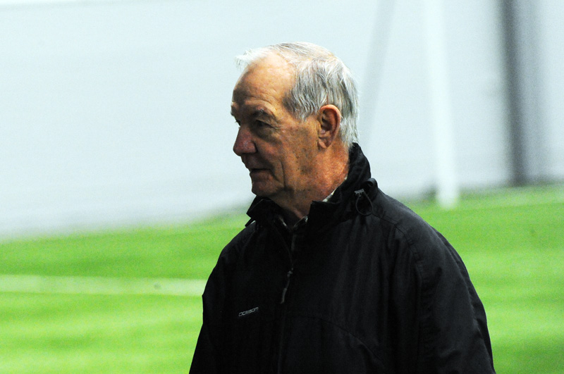 Tord Grip